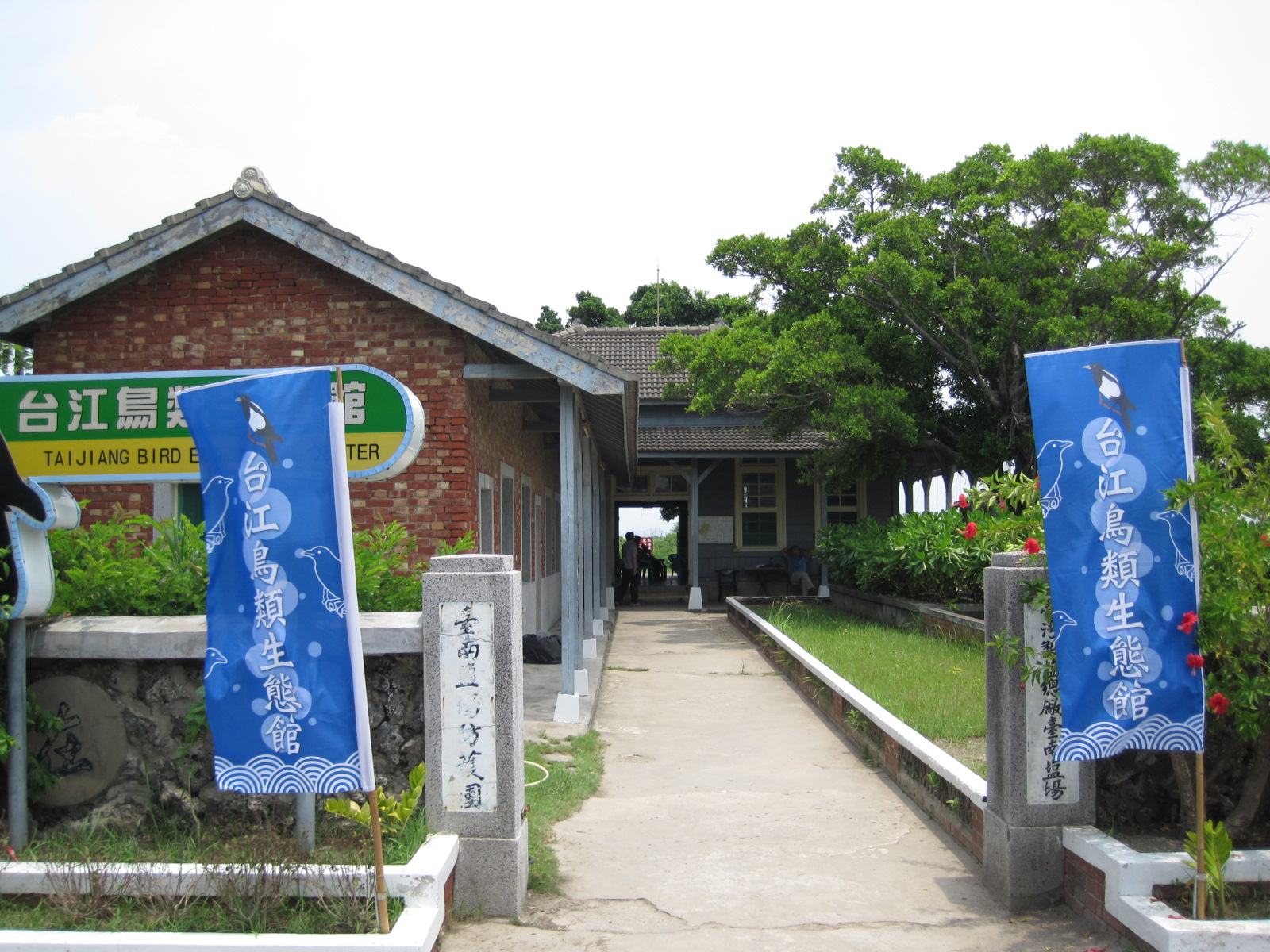 臺灣總督府專賣局臺南安順分室西面